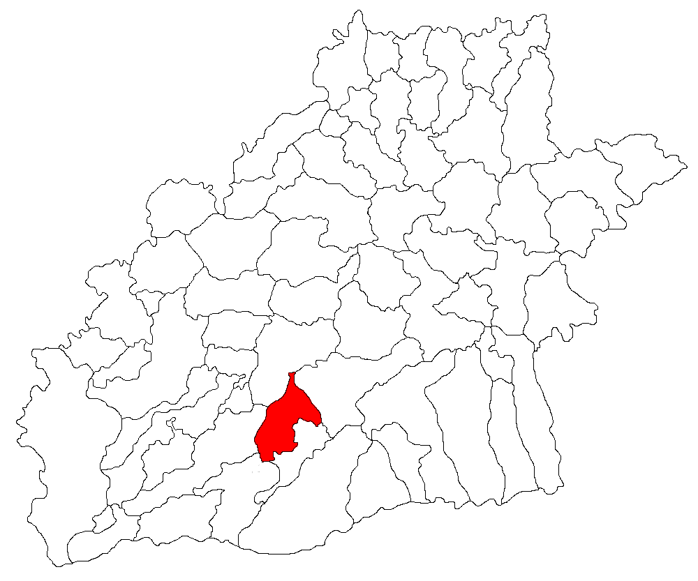 Categorie:Hărţi ale judeţului Sibiu Licensing Categorie:Imagini din Transilvania